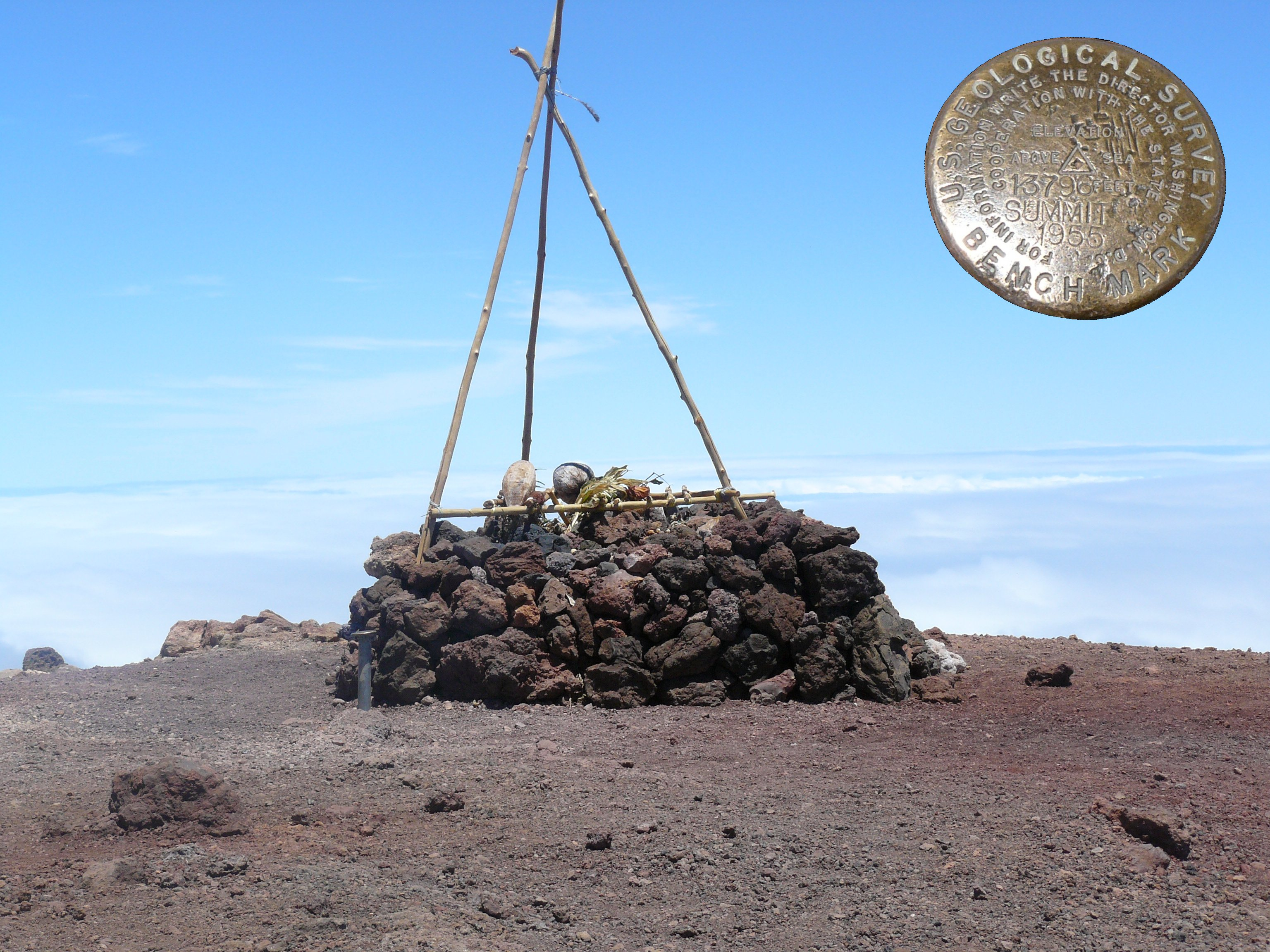 Autel hawaiien sur le Puʻu o Kukahauʻula, sommet du Mauna Kea. On peut apercevoir devant l'autel sur la gauche, (et en médaillon) la borne géodésique de l'USGS.